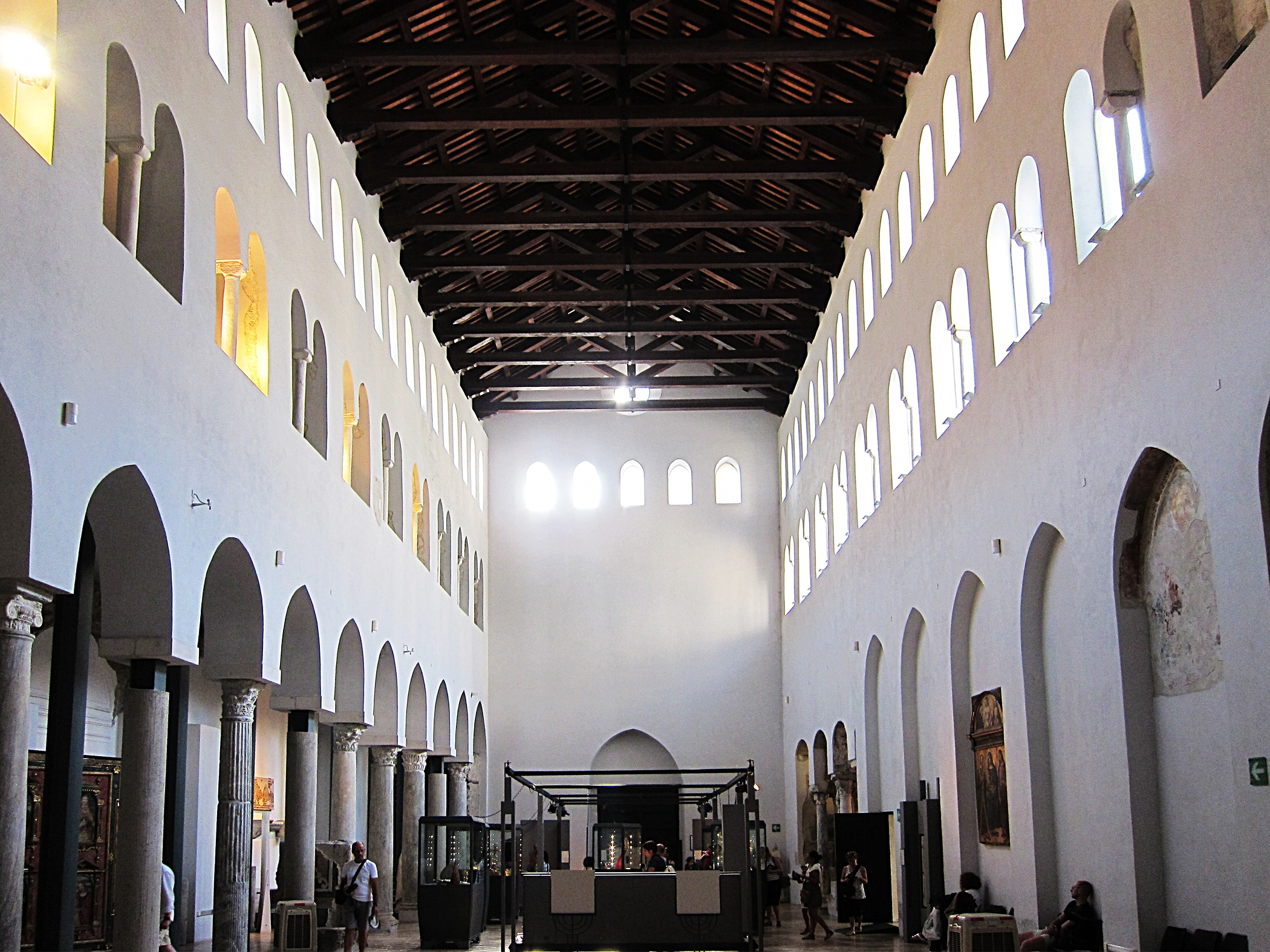 La basilique du crucifix dans le Duomo d'Amalfi (Italie).